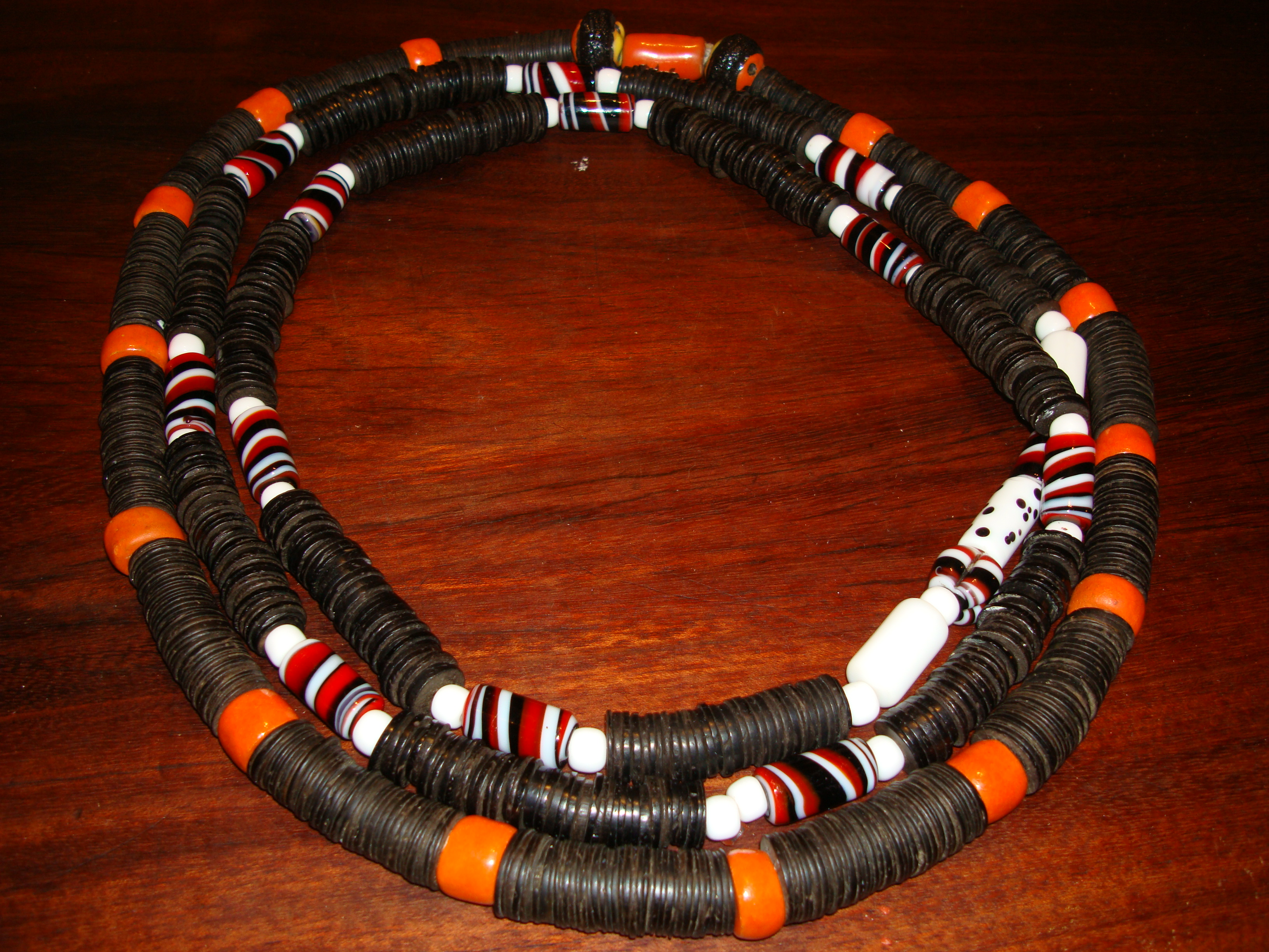 Lagdba, fio de conta do candomblé